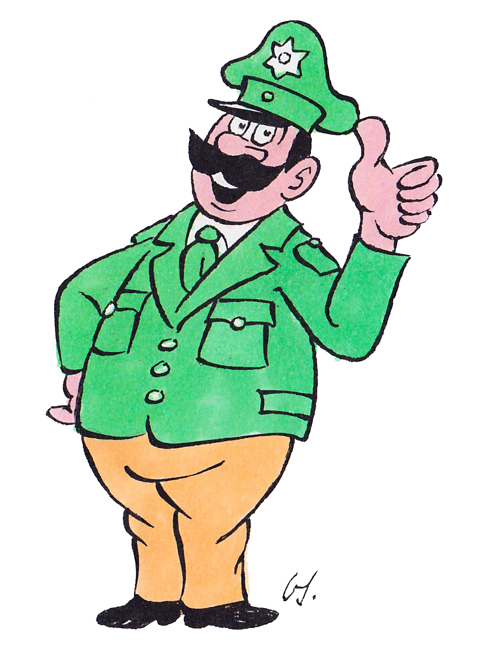 Oskar, der freundliche Polizist, gezeichnet vom Graphiker Otto Schwalge (*15. Februar 1921)